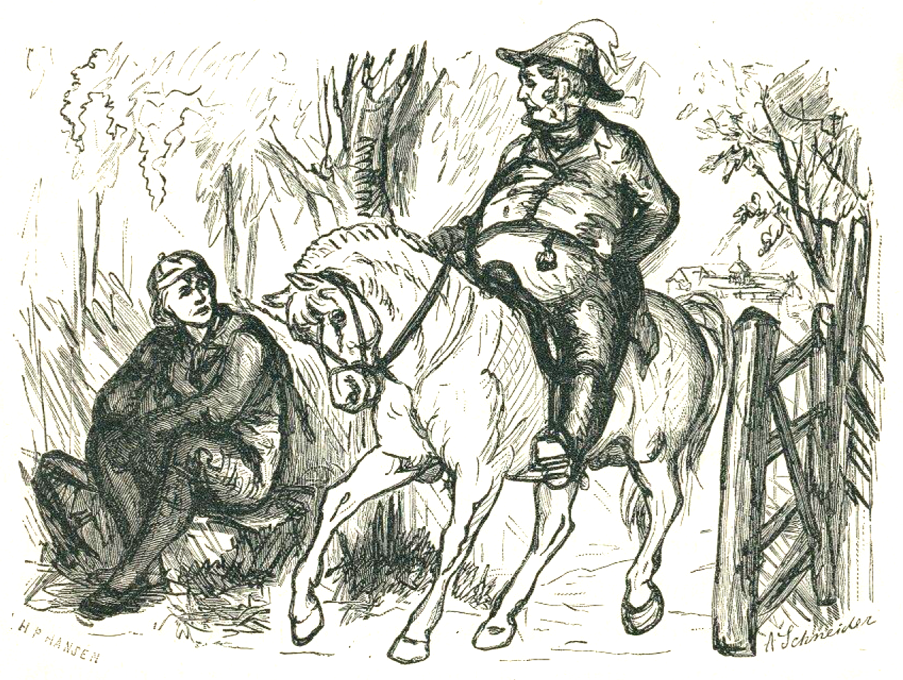 Illustration in "Norska folksagor och huldre-sägner" page 221 (Peik)